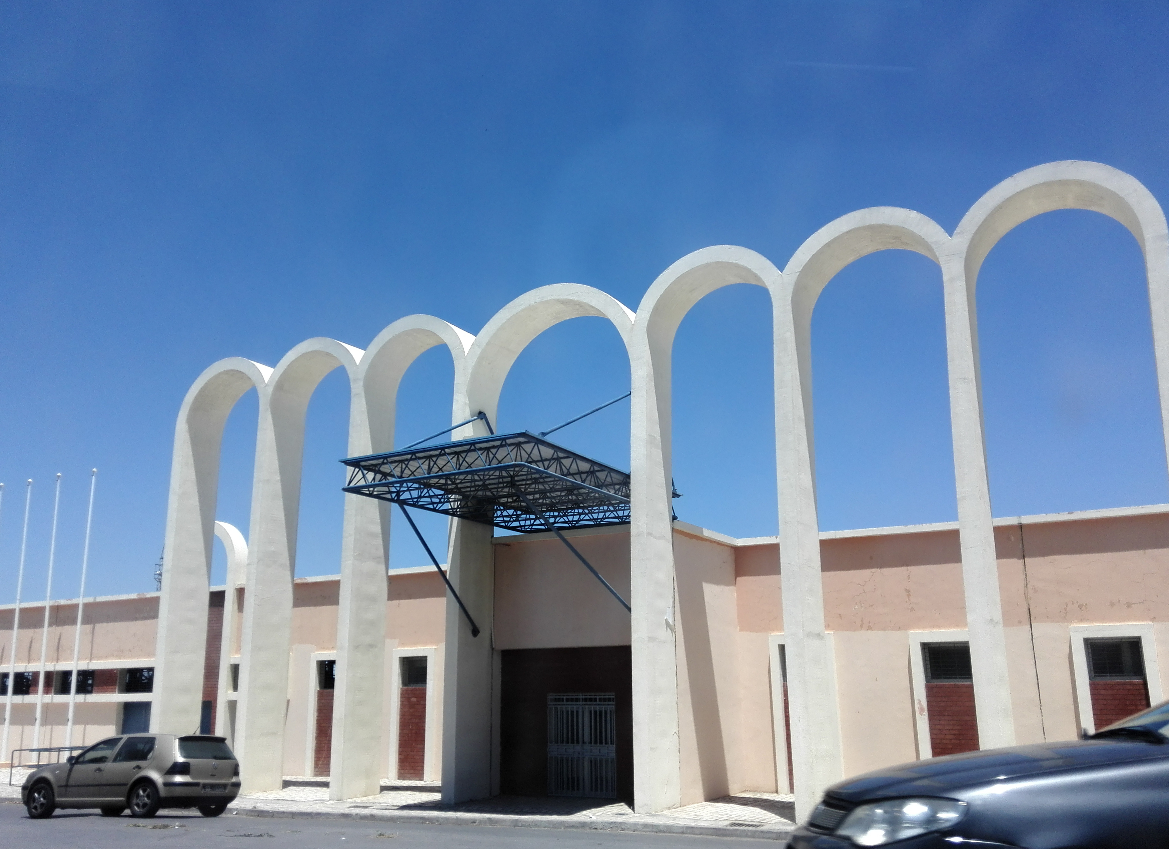 State Chedly Zouiten